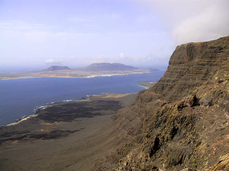 Steilküste des Famara-Massivs, im Hintergrund die Insel La Graciosa. Der Höhenunterschied zwischen der Famara-Hochfläche und dem Atlantik beträgt ca. 600 Meter.